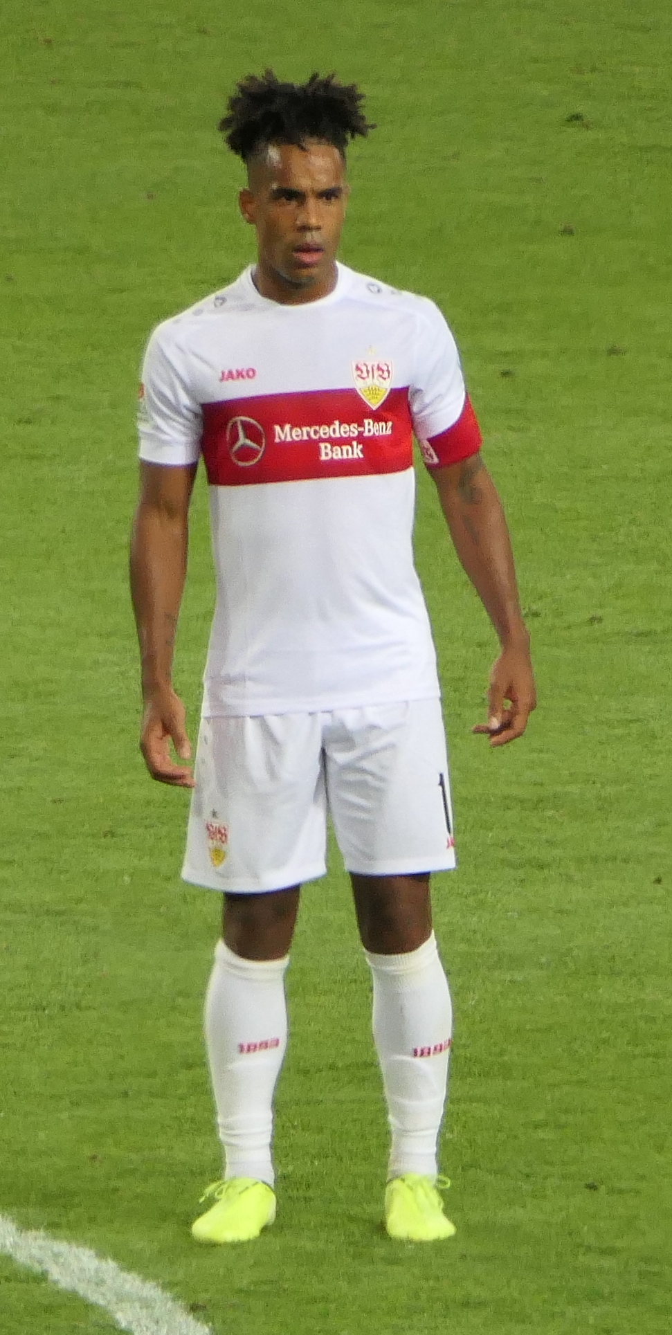 Der Fussballprofi Daniel Didavi im Trikot vom VfB Stuttgart beim Heimspiel gegen den VfL Bochum am 02.09.2019.